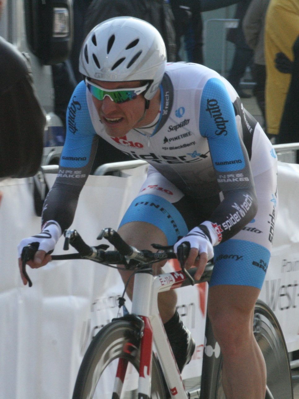 Driedaagse van West-Vlaanderen 2011, proloog in Middelkerke